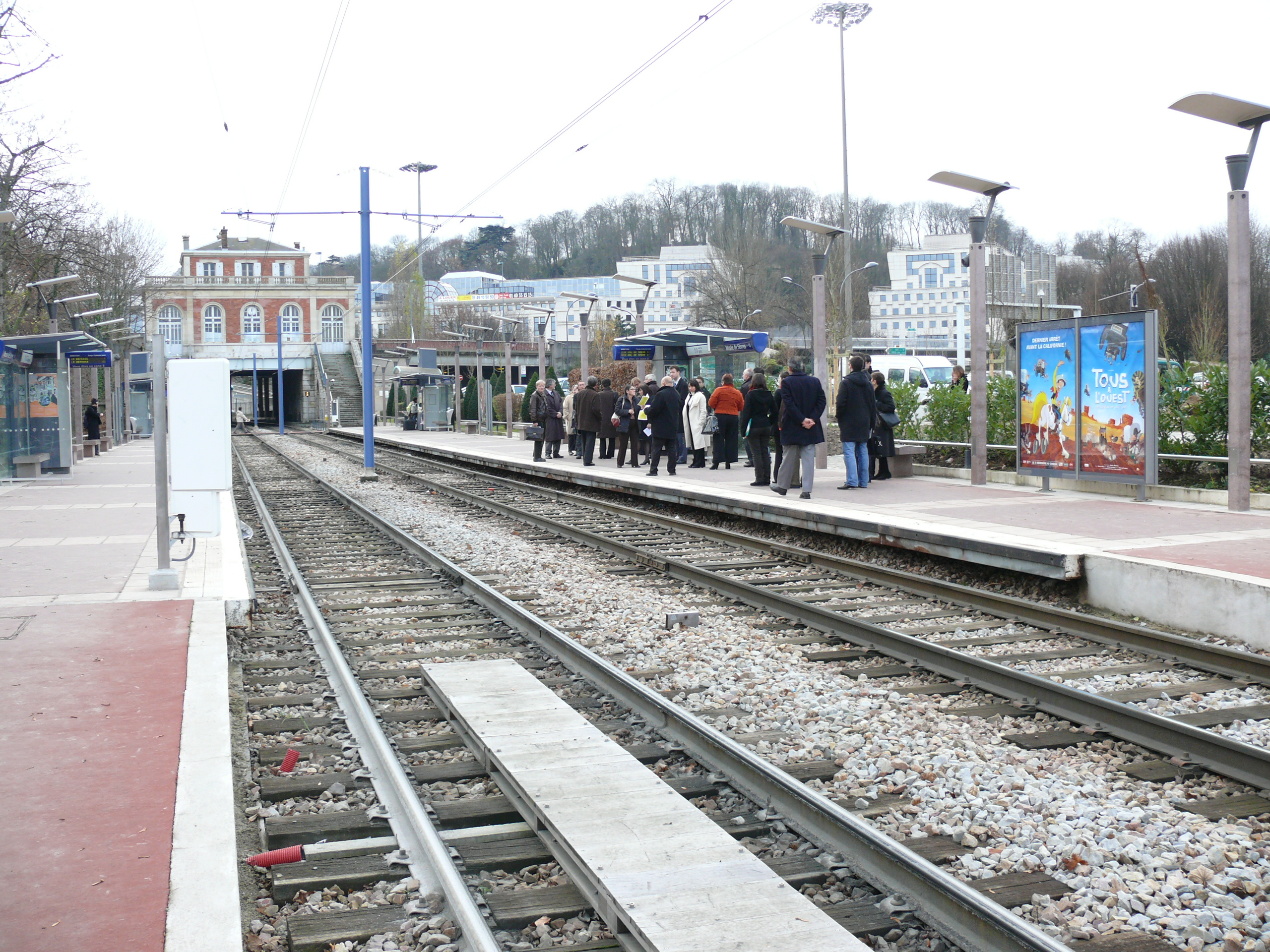 Station Musée de Sèvres de la Ligne 2 du tramway d'Île-de-France